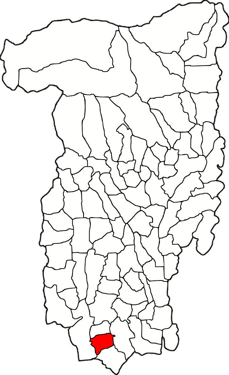 Lage der Gemeinde Făurești im Kreis Vâlcea (RO).